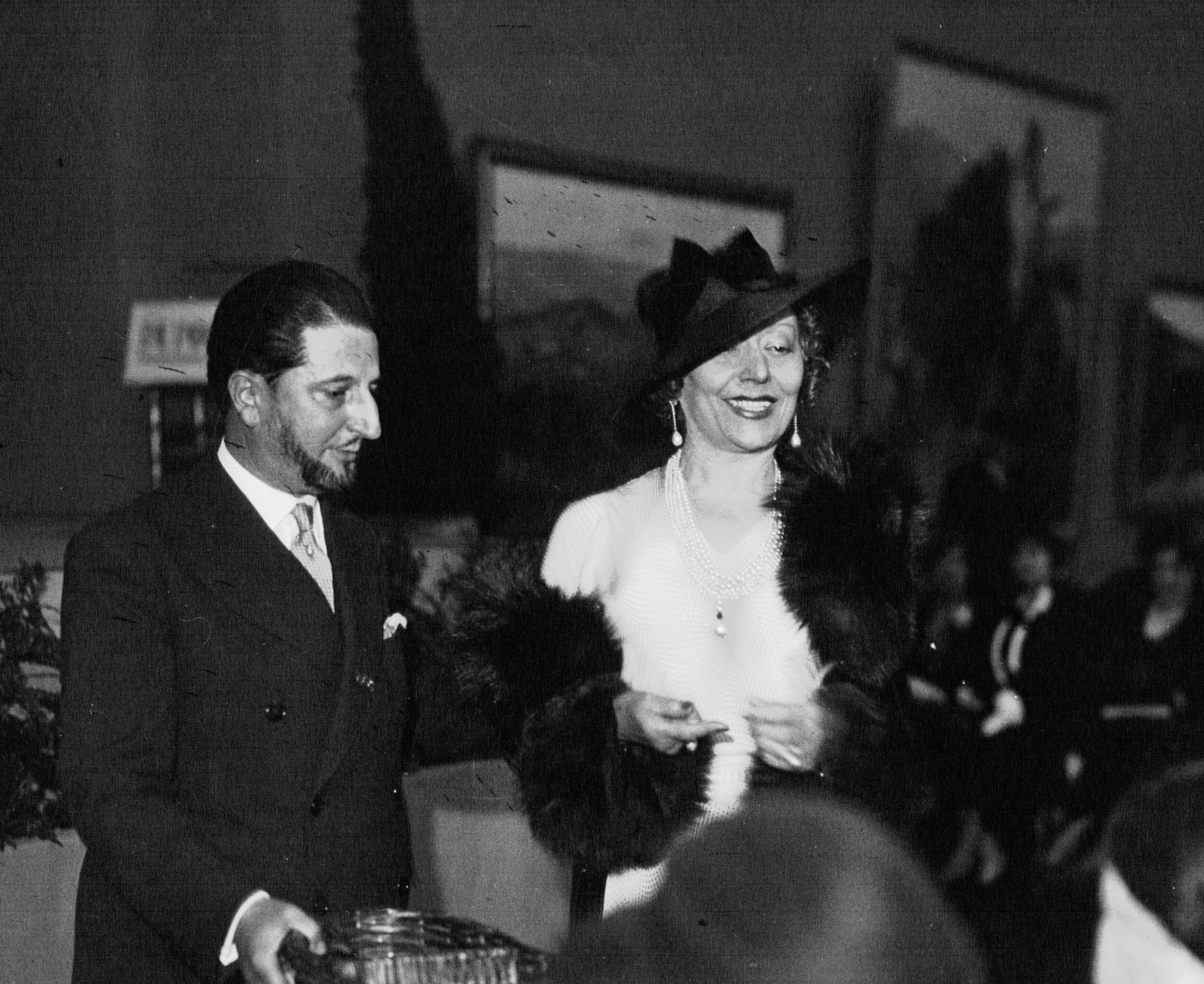 Au Salon, Cécile Sorel et le peintre Domergue - (photographie de presse) - Agence Meurisse